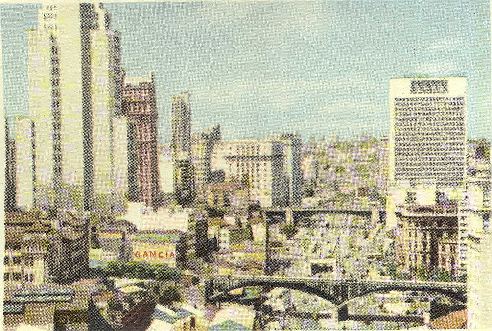 Obra que integra o acervo do Museu Paulista da USP. Coleção Werner Haberkorn